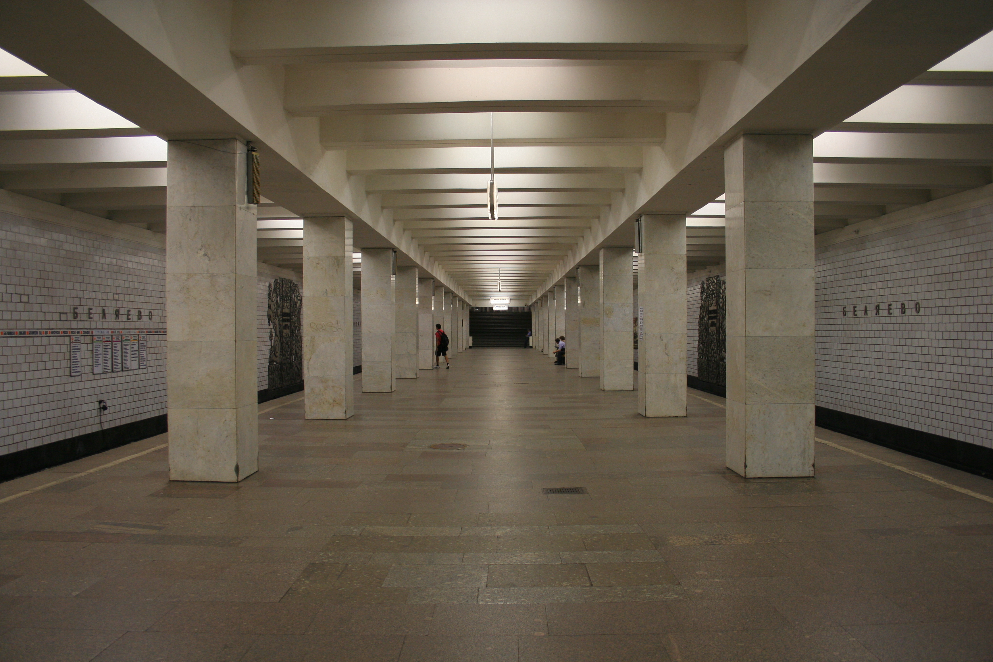 U-Bahnhof Beljajewo der Metro Moskau.